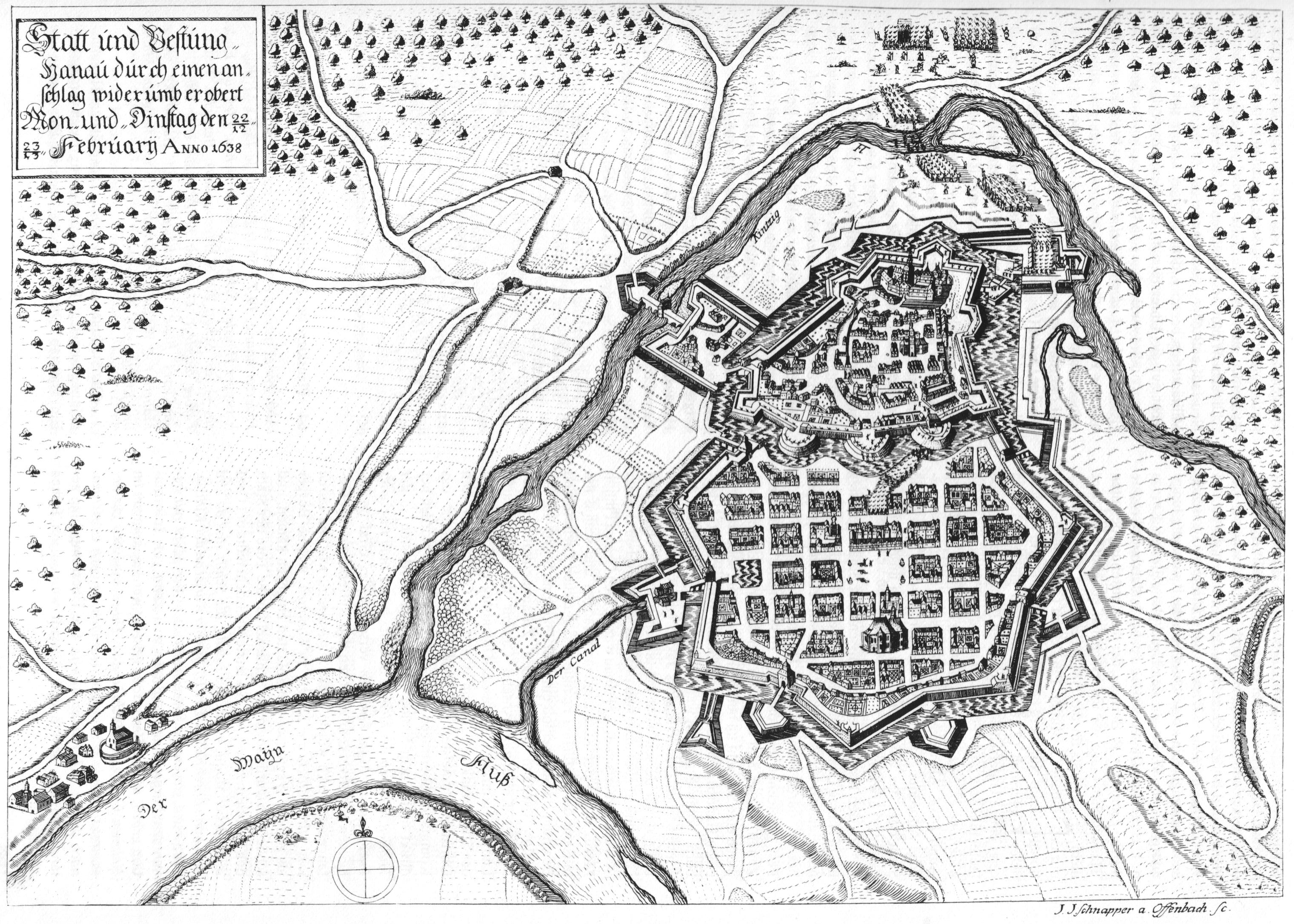 Besetzung der beiden Städte Hanau am 12. und 13.2.1638, bezeichnet oben links Statt und Vestung= / Hanau durch einen an= / schlag wiederumb erobert Mon. und Dinstag den 22/12= / 23/13 = Februarij Anno 1638 Kupferstich, zeigt die Befreiung Hanaus von der schwedischen Besatzung unter Jakob von Ramsay durch Johann Winter von Güldenborn. Die Landschaft wurde durch den Kupferstecher von dem bekannten Belagerungsplan Matthäus Merians übernommen, die Schanzen entfernt und andere Truppen eingesetzt (siehe dazu H. Bott, Hanauer Geschichtsblätter 18, 1962 S. 219). Aufgrund der doppelten Datierung nach altem und neuem Stil ist das Werk im 17. Jahrhundert anzusetzen, siehe Quelle S. 166.